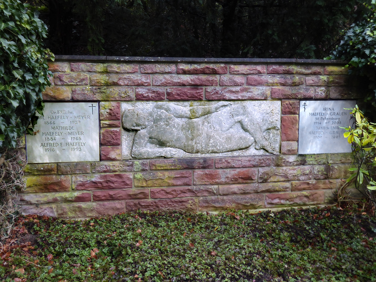 Emil Häfely -Meyer (1866–1939), Dr.Ing.h.c. Fabrikant für elektrische Isoliertechnik, Politiker, Familiengrab auf dem Friedhof Hörnli, Riehen, Basel-Stadt